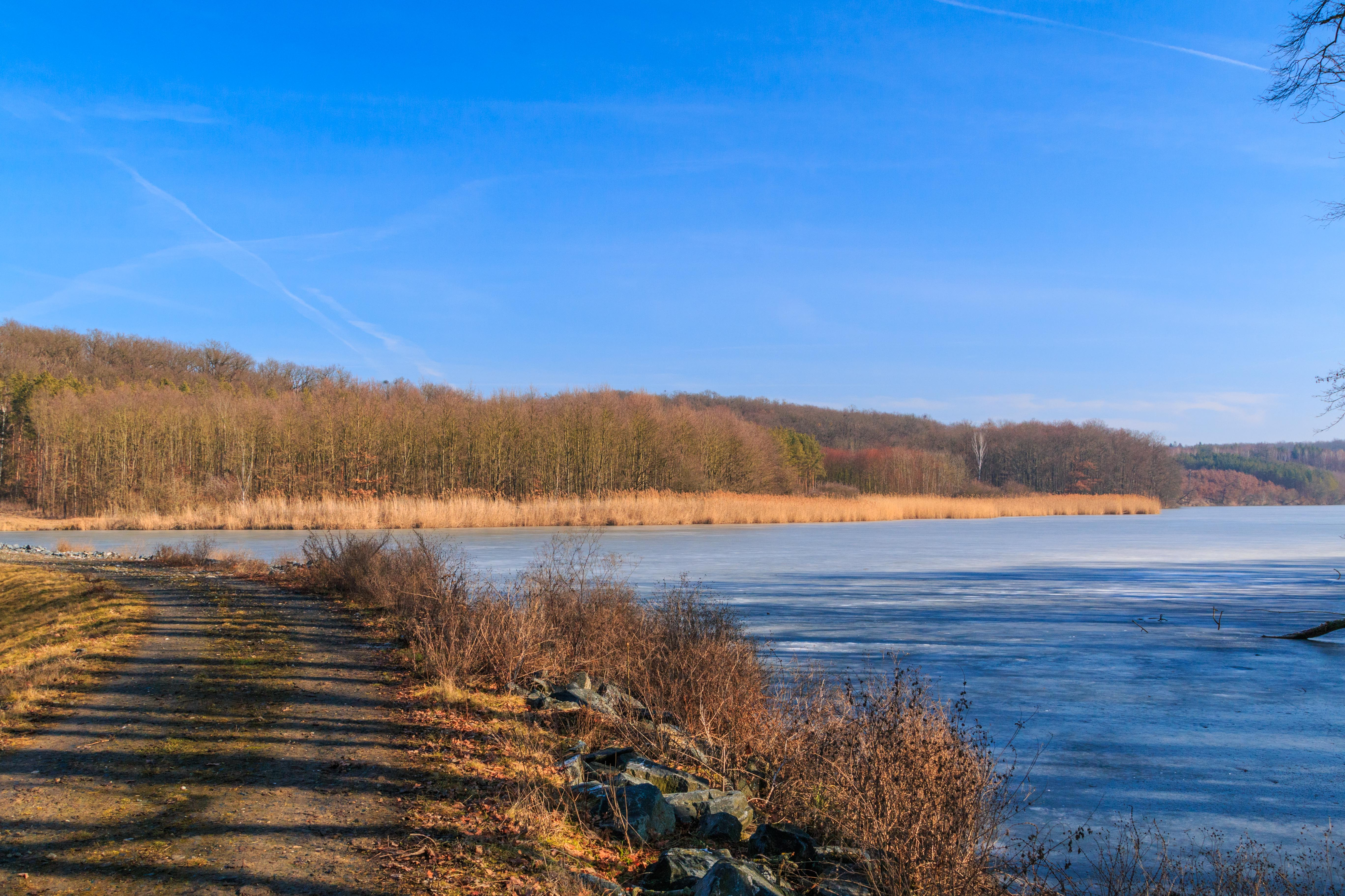 Komárovský rybník (Chotěšice) Project: Vodstvo. Ticket: 1711.